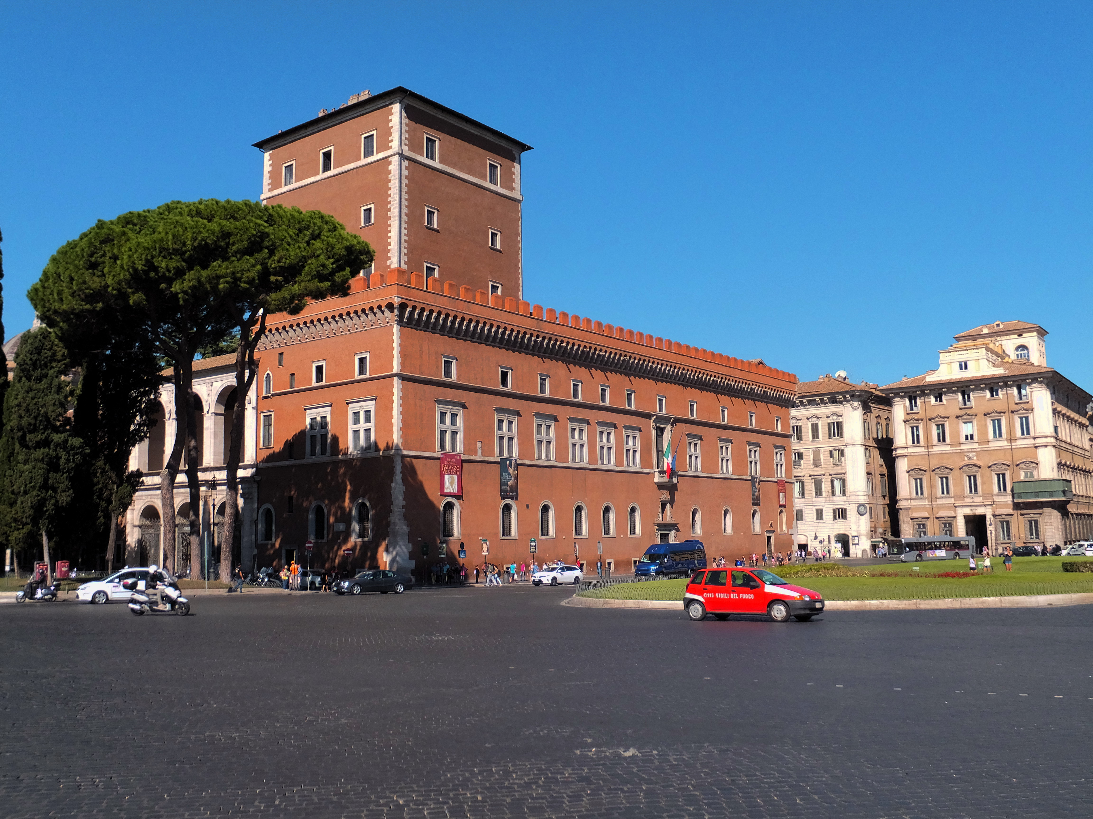 Instituto Per La Storia Del Risorgimento Italiano 義大利復興運動史研究所